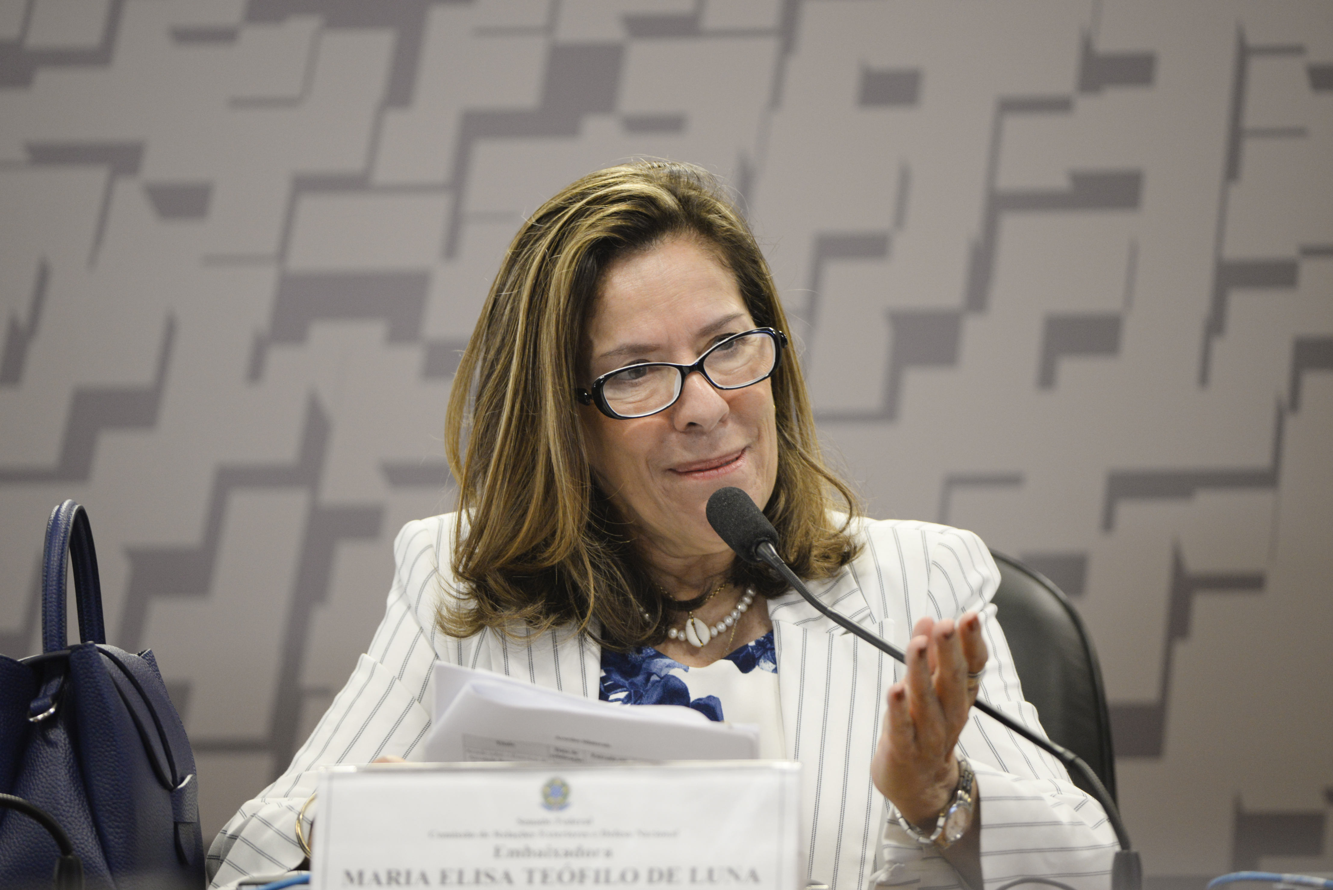 Comissão de Relações Exteriores e Defesa Nacional (CRE) realiza sabatina de indicados para embaixadores do Brasil em Gana e no México. Em pronunciamento, indicada para exercer o cargo de Embaixadora do Brasil na República de Gana, Maria Elisa Teófilo de Luna. Foto: Leopoldo Silva/Agência Senado